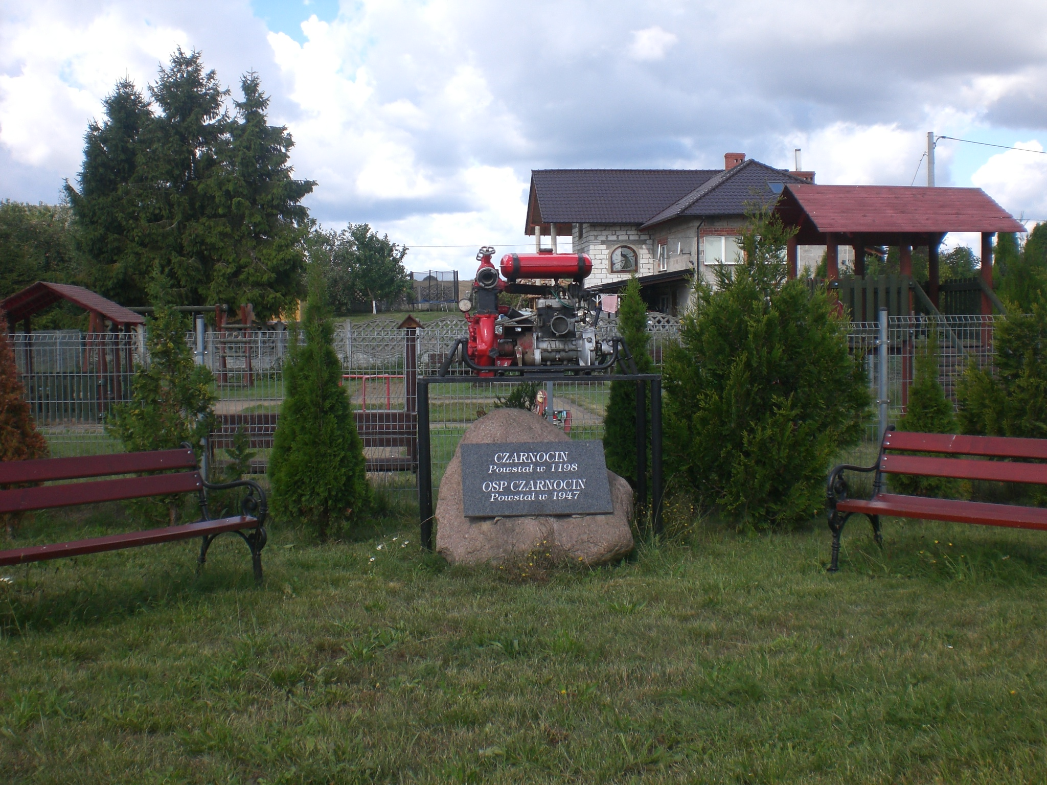 Czarnocin